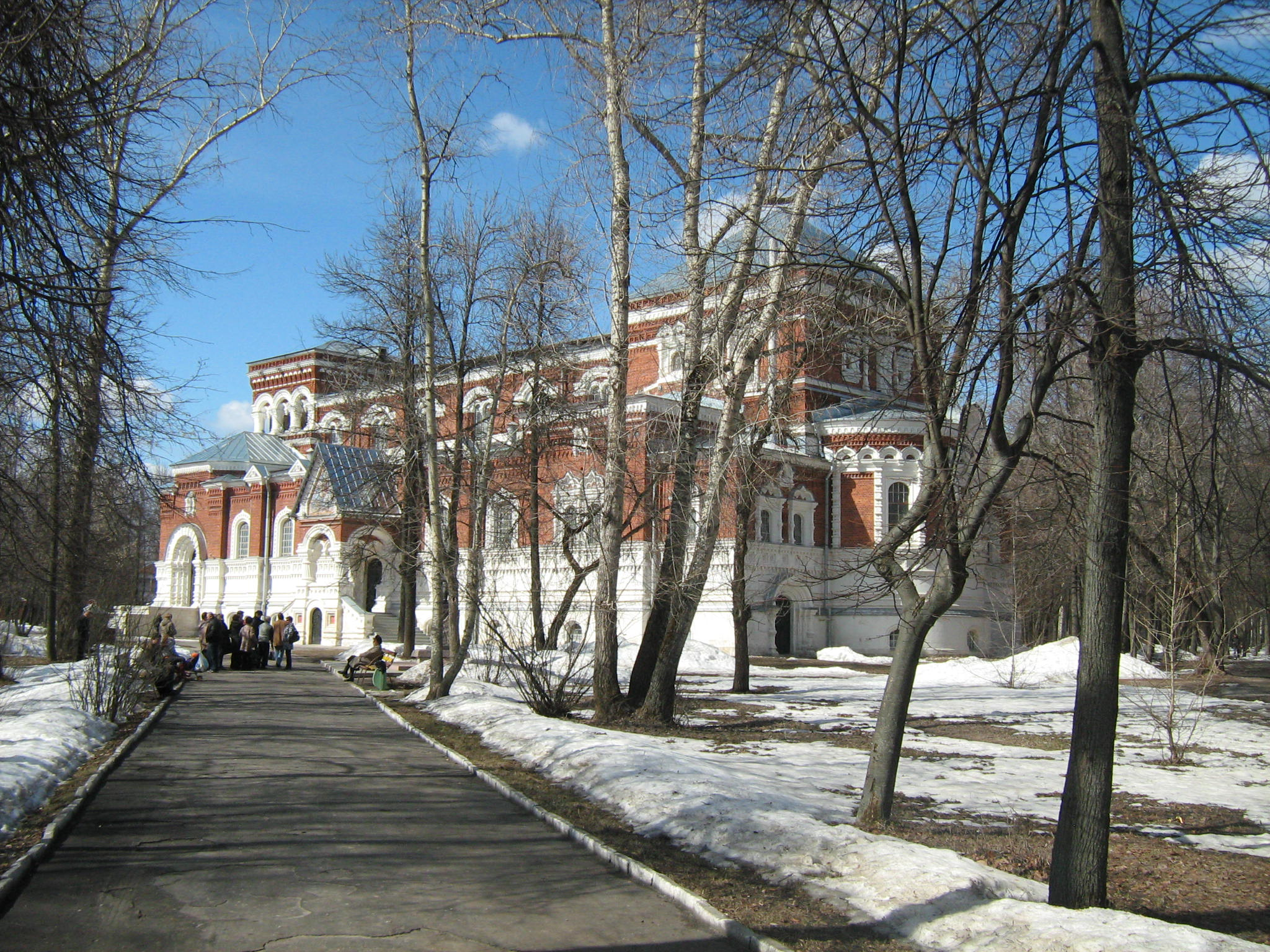 Собор (Владимирская область, Гусь-Хрустальный, Калинина улица, 11-а)